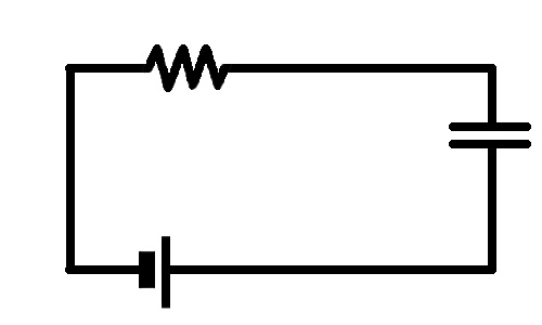 직류회로도